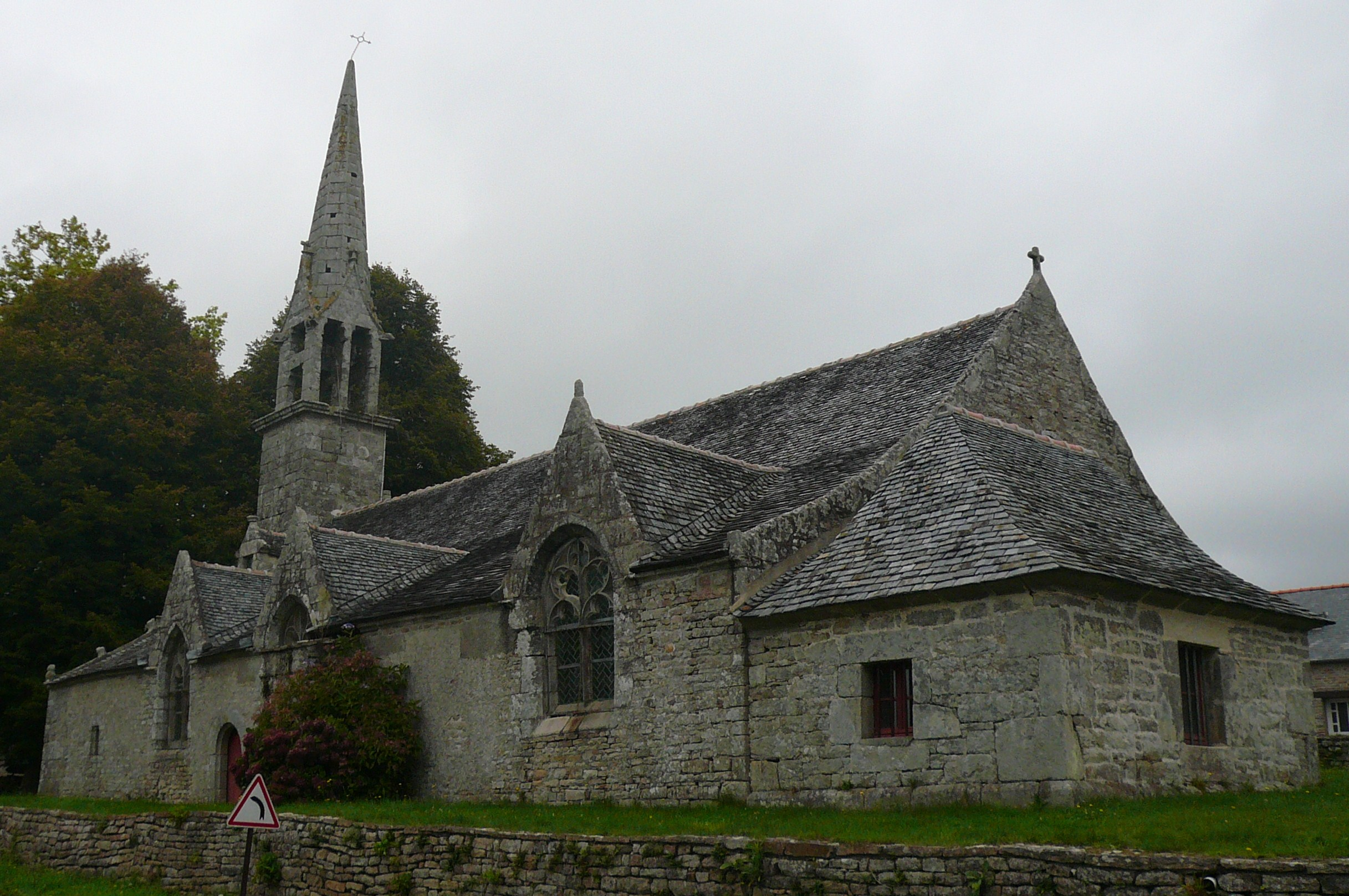 Vue d'ensemble, prise du sud-est, de la chapelle de Locmaria-an-Hent, Saint-Yvi, Finistère, Bretagne, France.